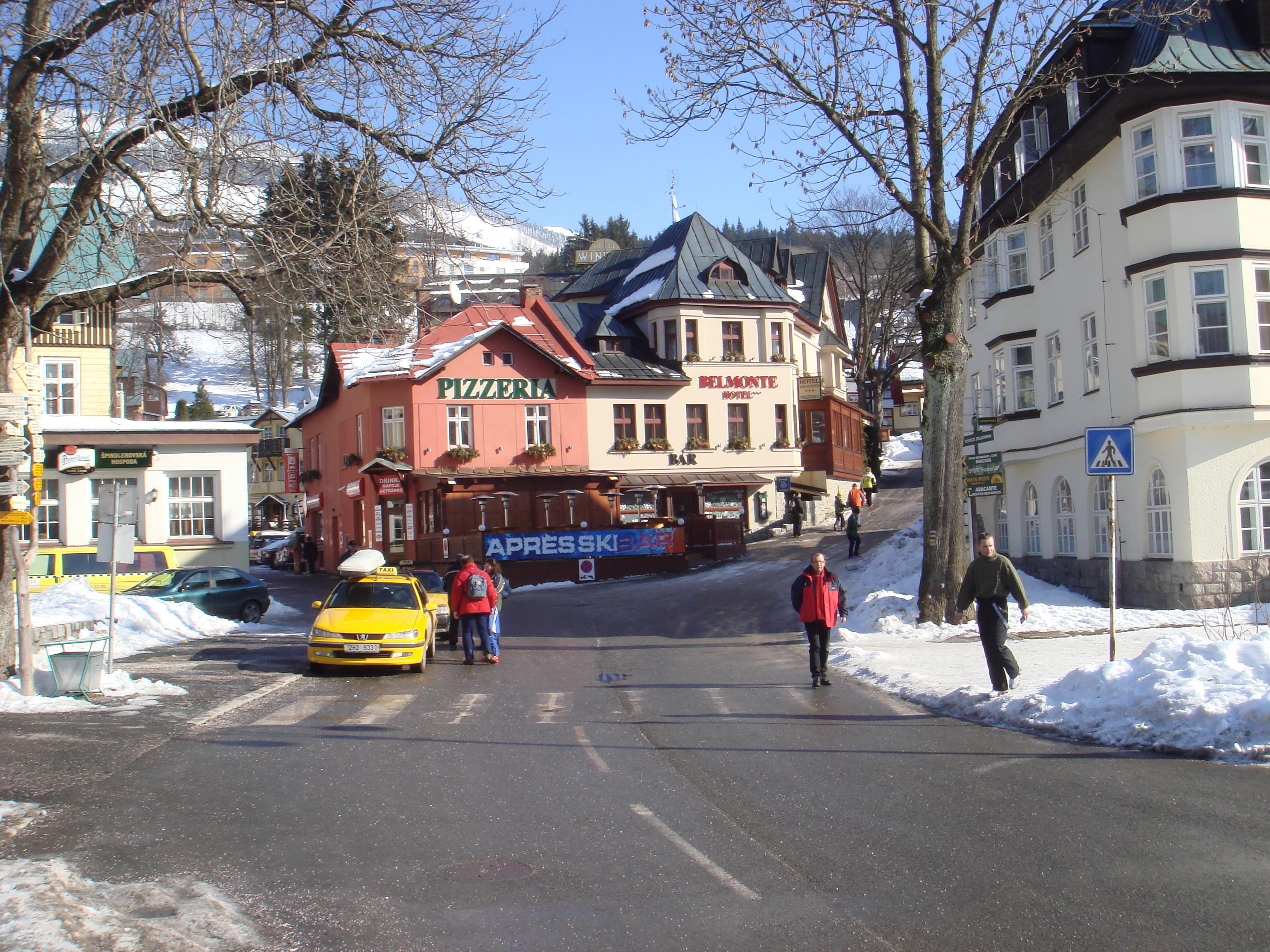 עיירת הסקי שפינדלרוב מלין